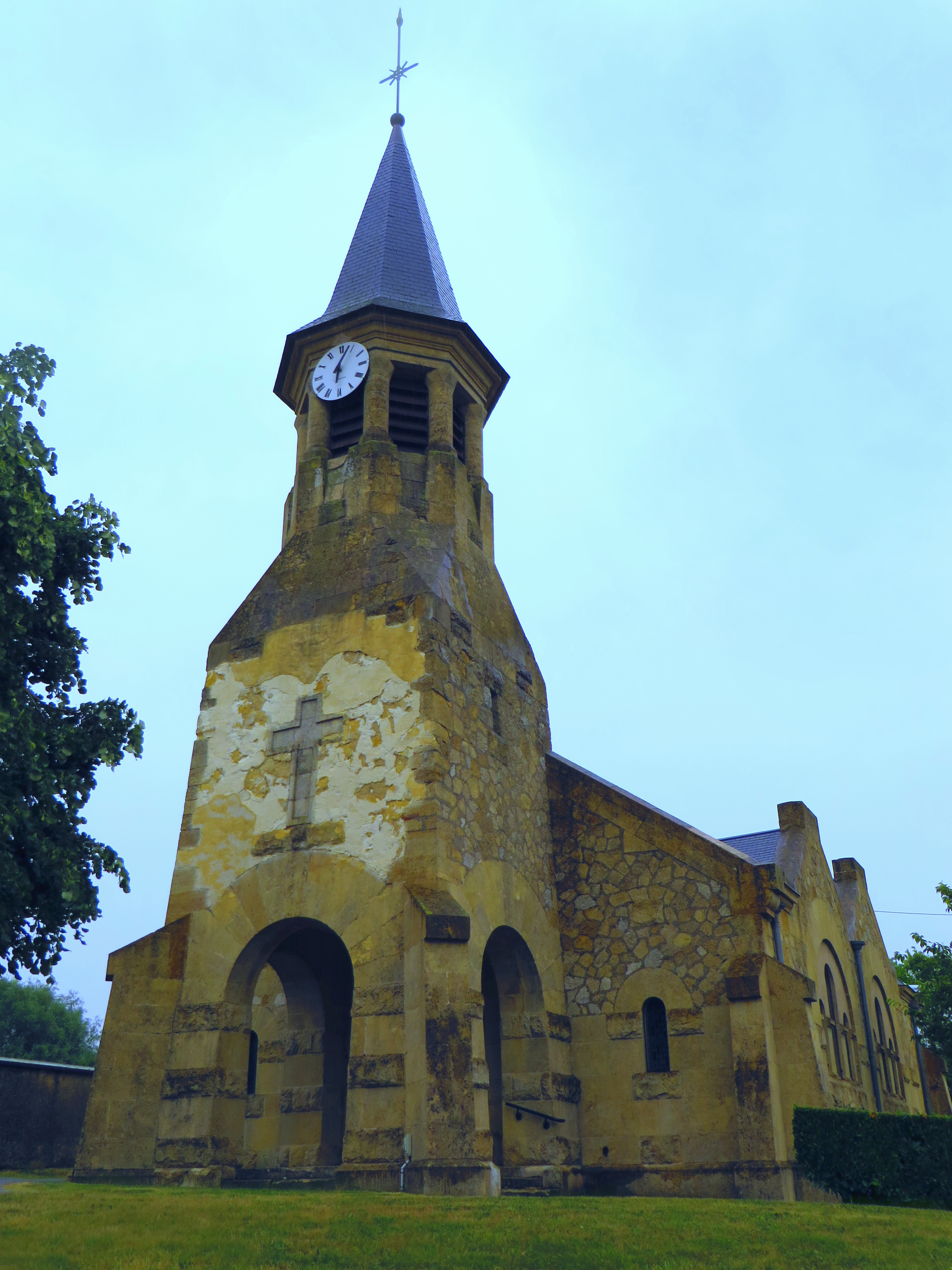 Morgemoulin L'église Saint-Christophe